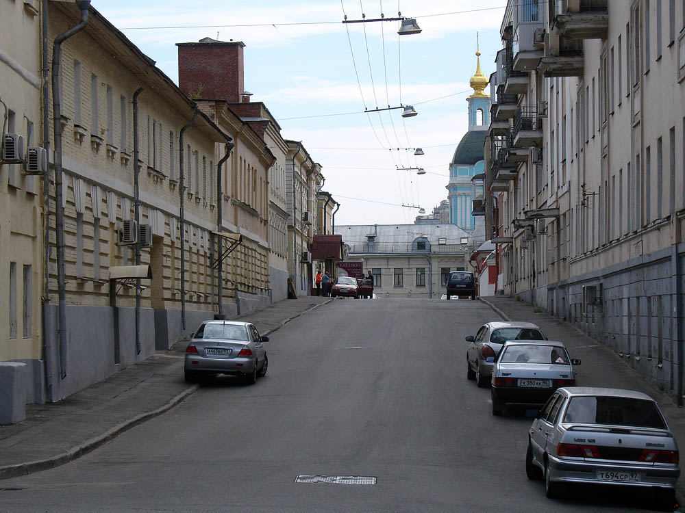 Moscow, Petropavlovsky Lane RUSSIAN: Москва. Петропавловский переулок, бывшая Хитровка